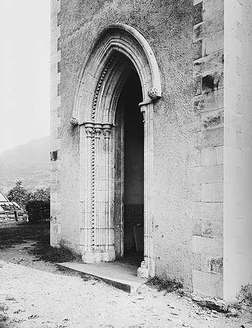 Hovudinngangsportalen i Ullensvang kyrkje